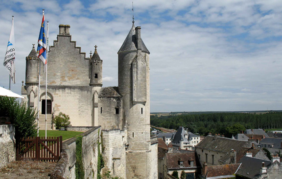 Chateau de Loches